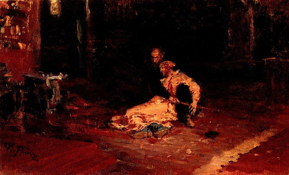 Sketch.